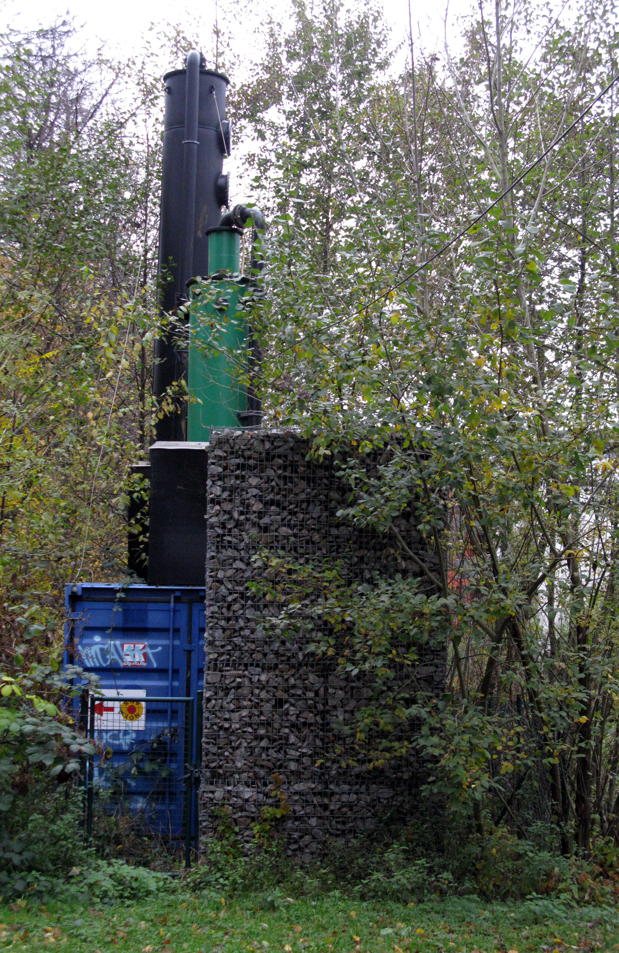 inzwischen abgebaute Anlage zur Reinigung des Grundwassers von Kohlenwasserstoffen im Freiburger Stadtteil Vauban